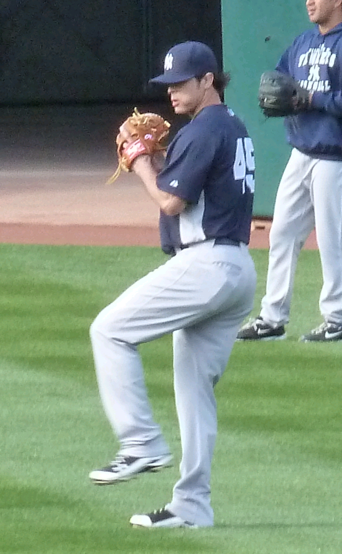 Sergio Mitre